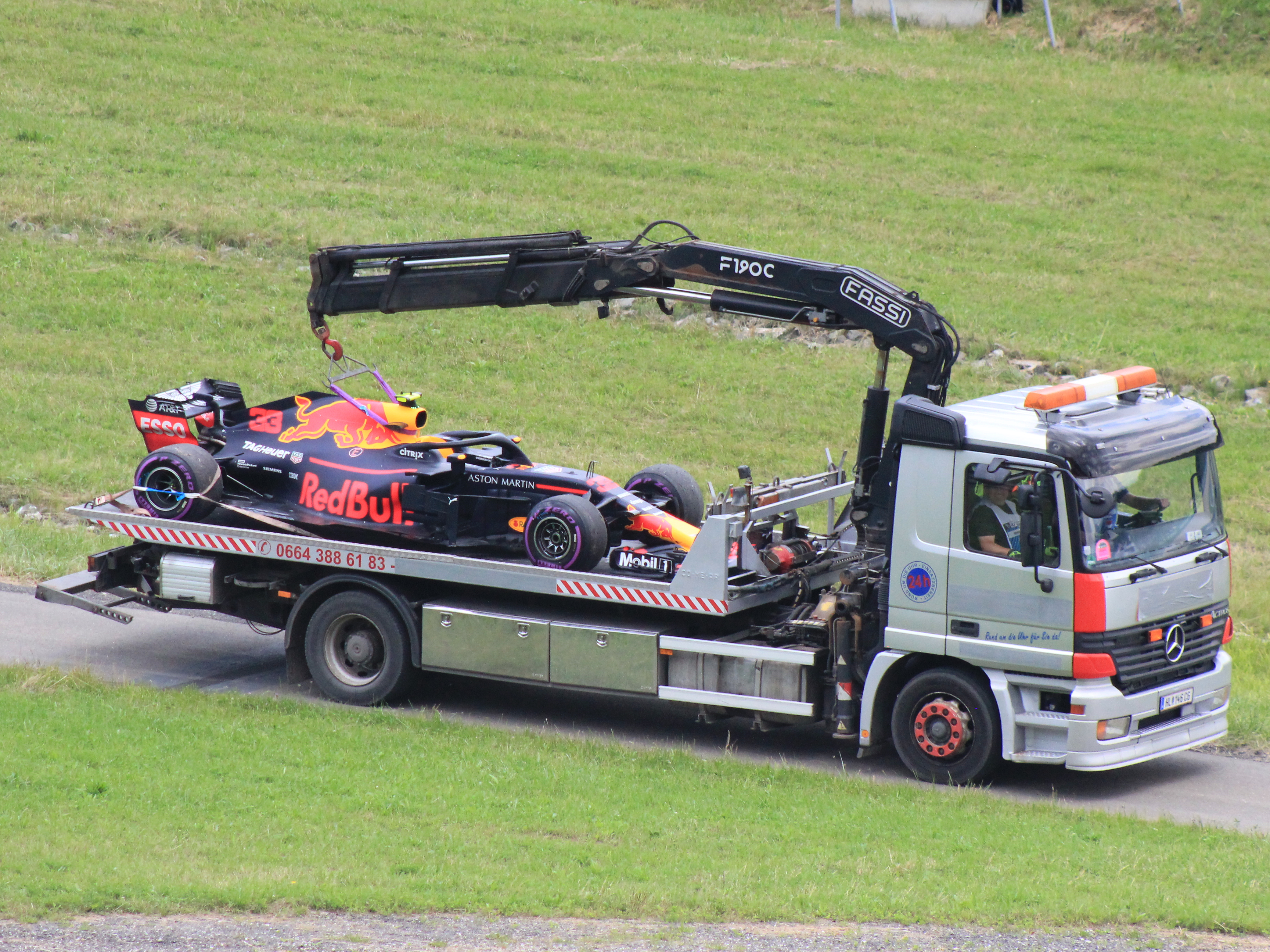 Verstappens Wagen im dritten freien Training wird abgeschleppt